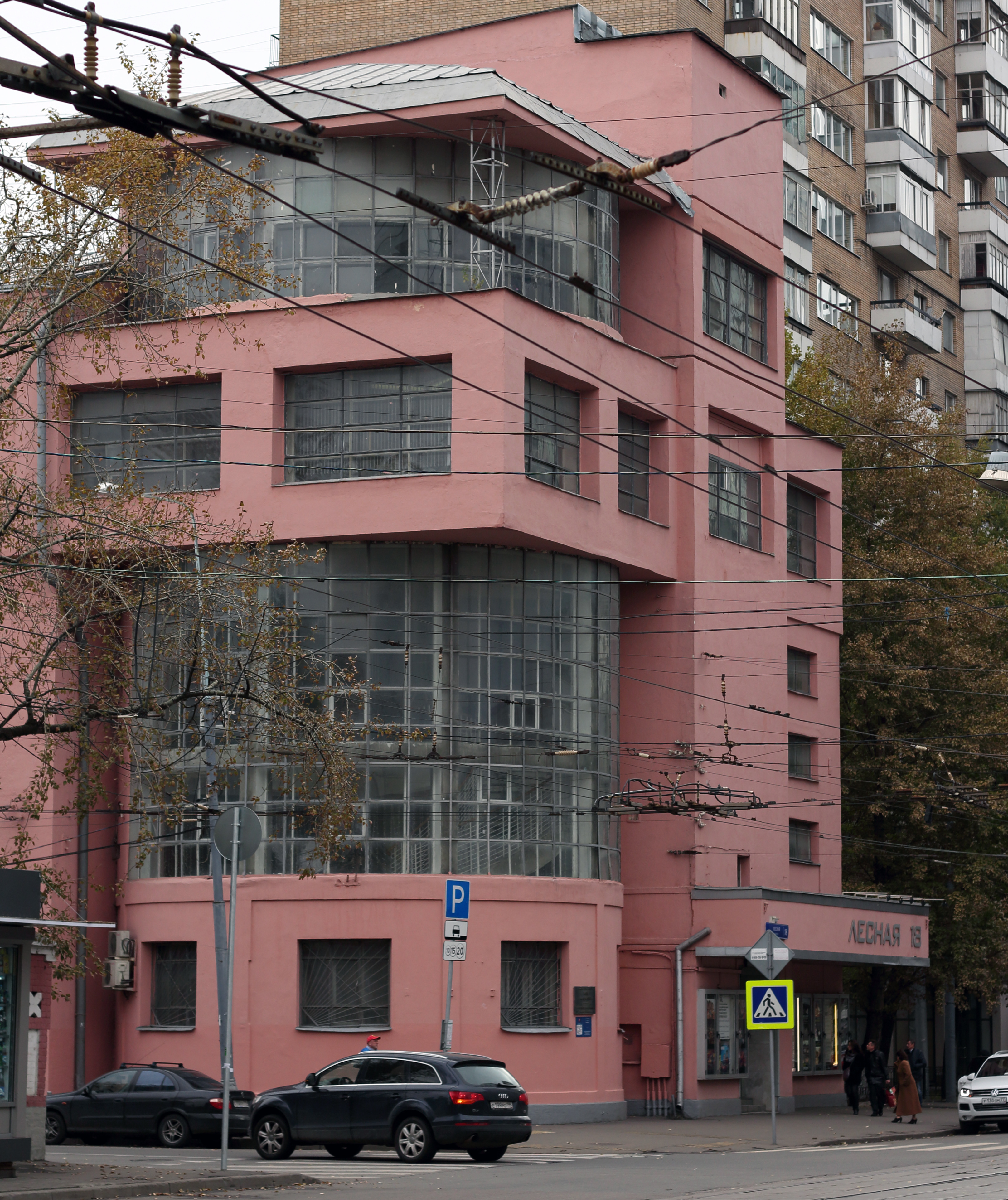 Здание клуба им. Зуева (Москва и Московская область, Москва, Лесная улица, 18)